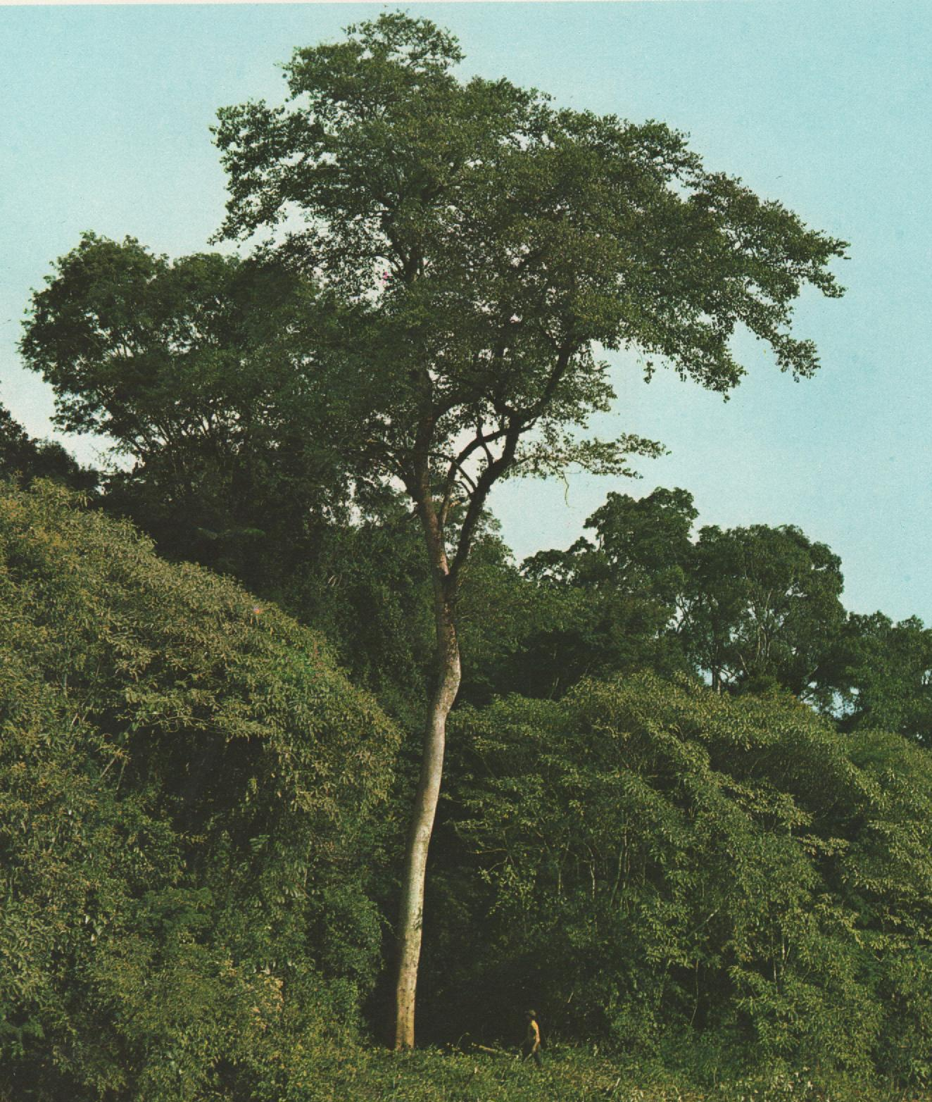 Ejemplar de Maclura tinctoria en Argentina